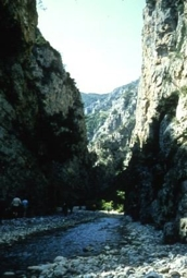 Paso de las Termopilas